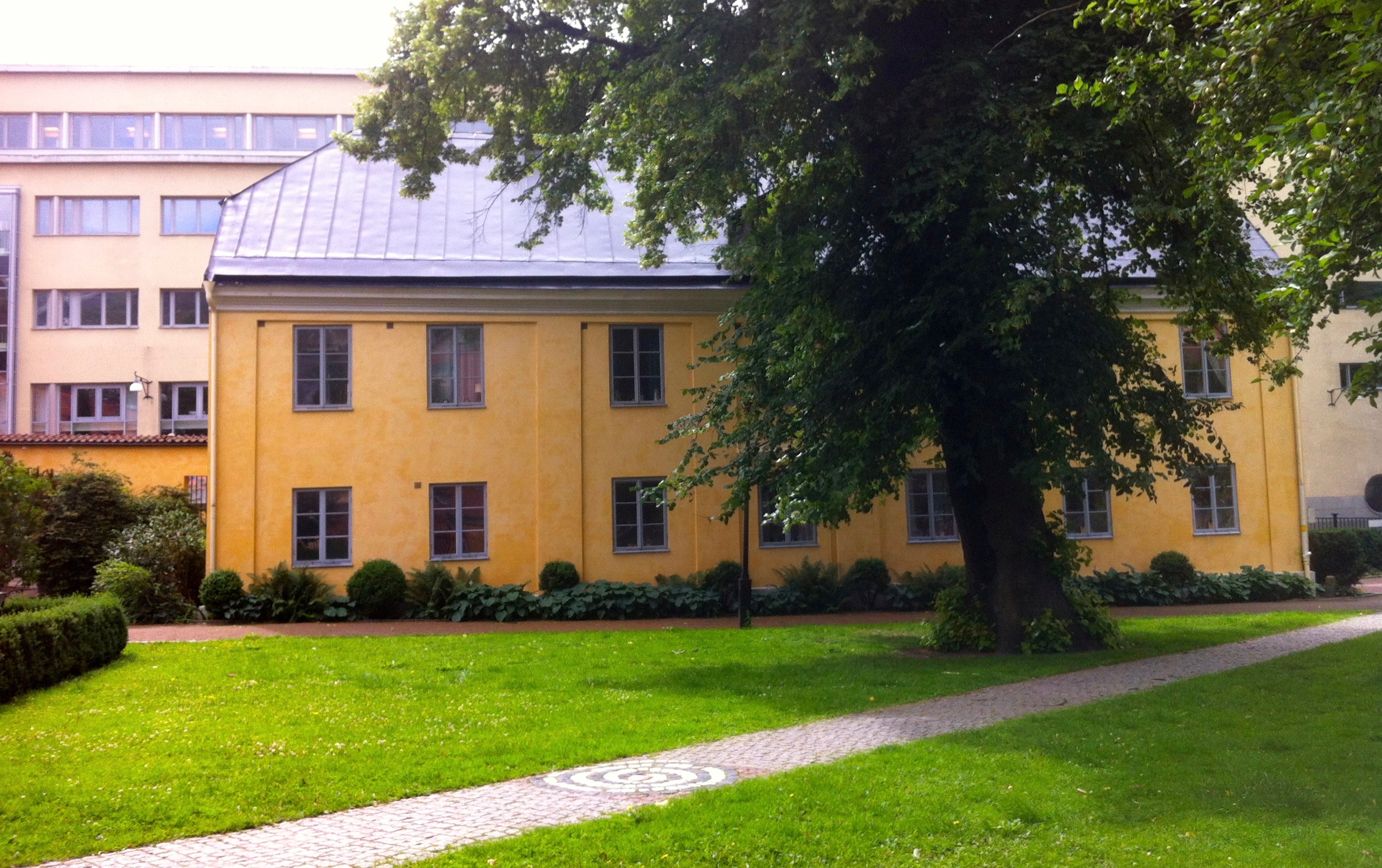 Kronhusparken med huset vid Postgatan 4. Huset är byggnadsminne sedan 24 oktober 1968.